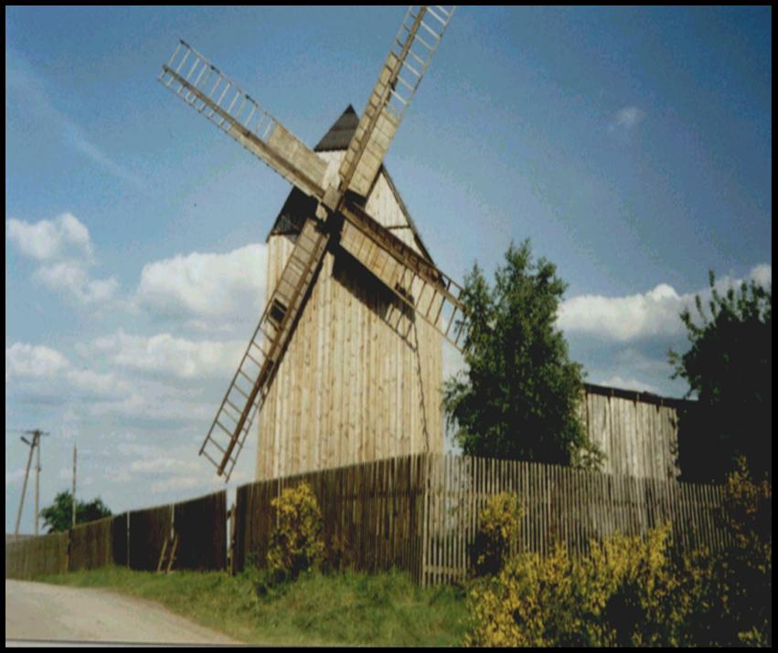 Wiatrak w Kocilewie koło Ożarowa z 1914 r. 10.1986.